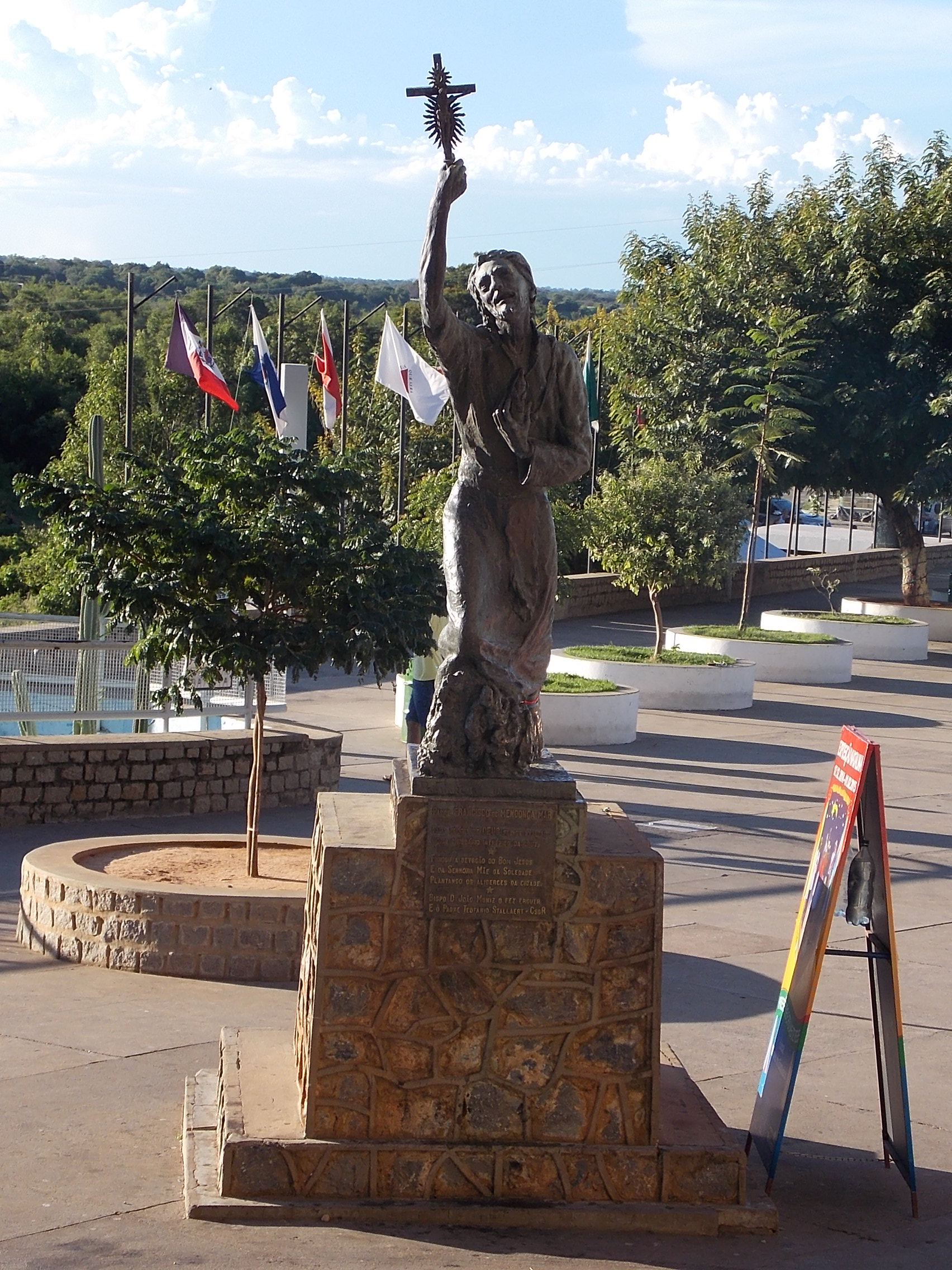 Estátua de Padre Francisco da Soledade encontrada a porta do Santuário de Bom Jesus da Lapa